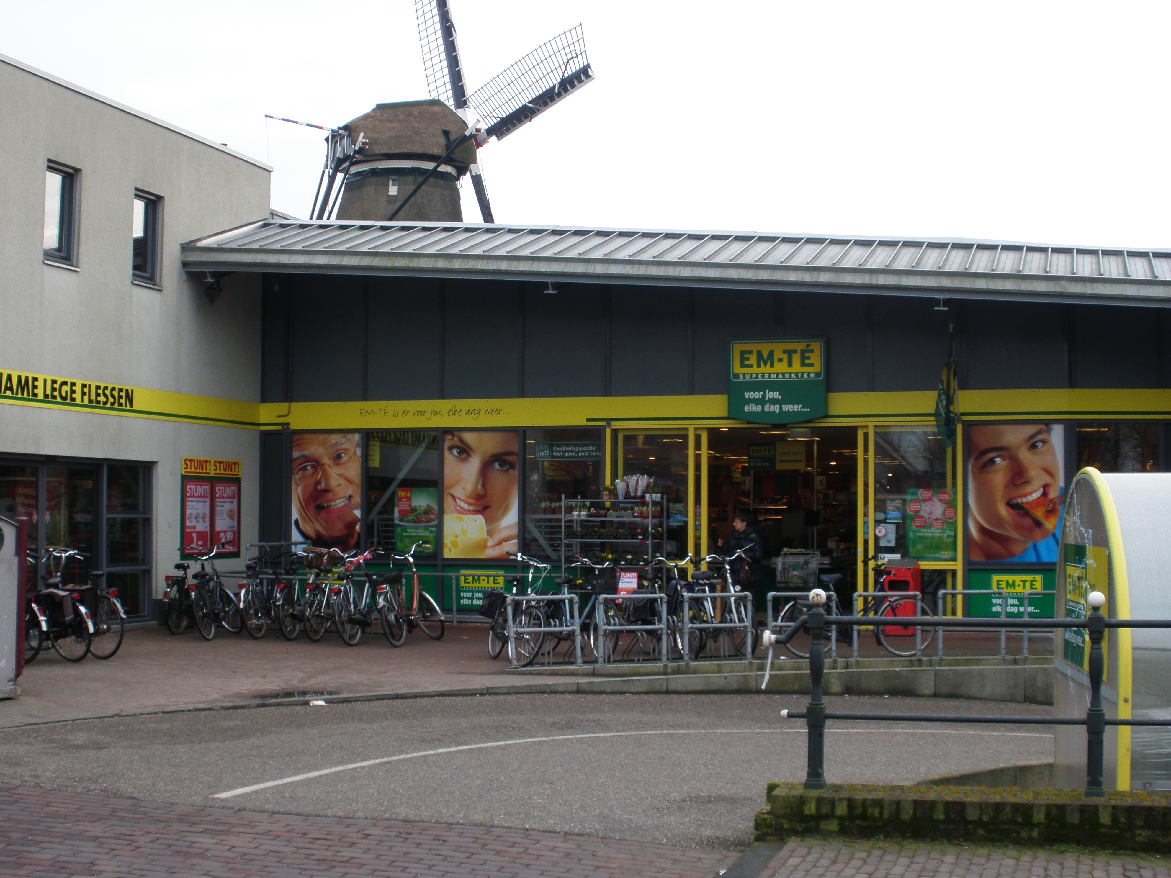 EMTÉ Supermarkt Montfoort.